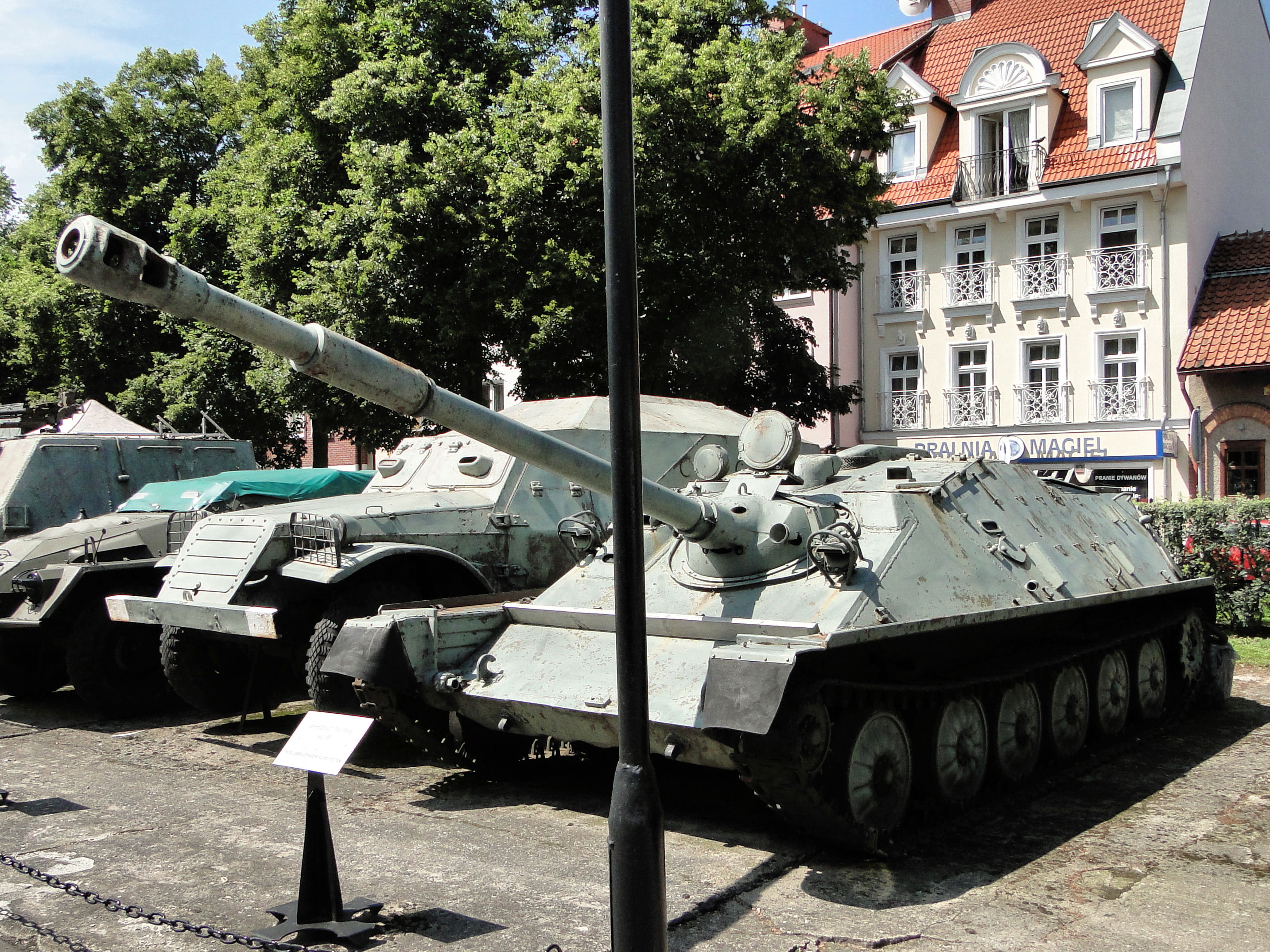 Działo pancerne ASU-85